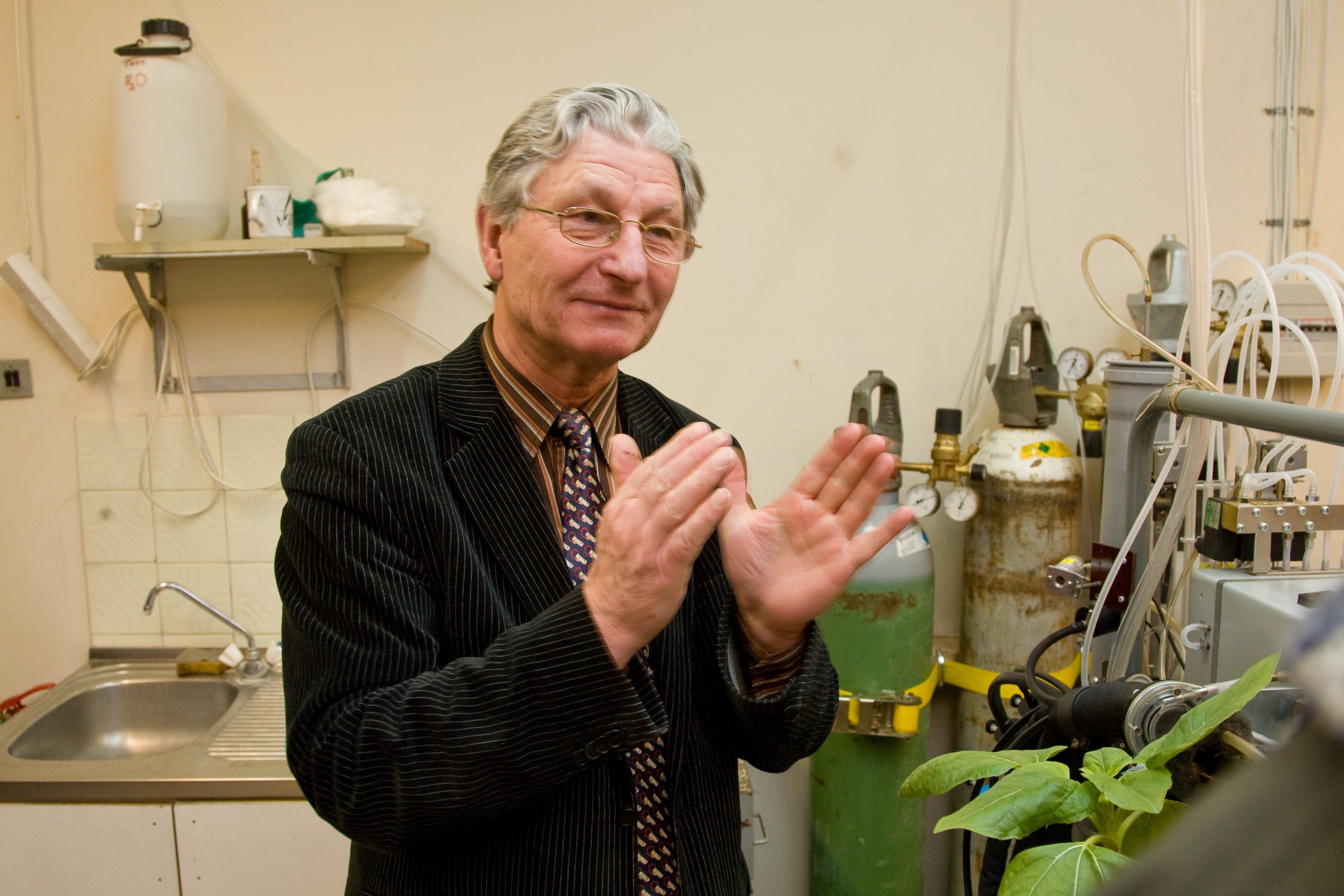 Biofüüsika ja taimefüsioloogia õppetooli taimede fotosünteesi uurimisgrupi juhataja, erakorraline vanemteadur, akadeemik Agu Laisk.